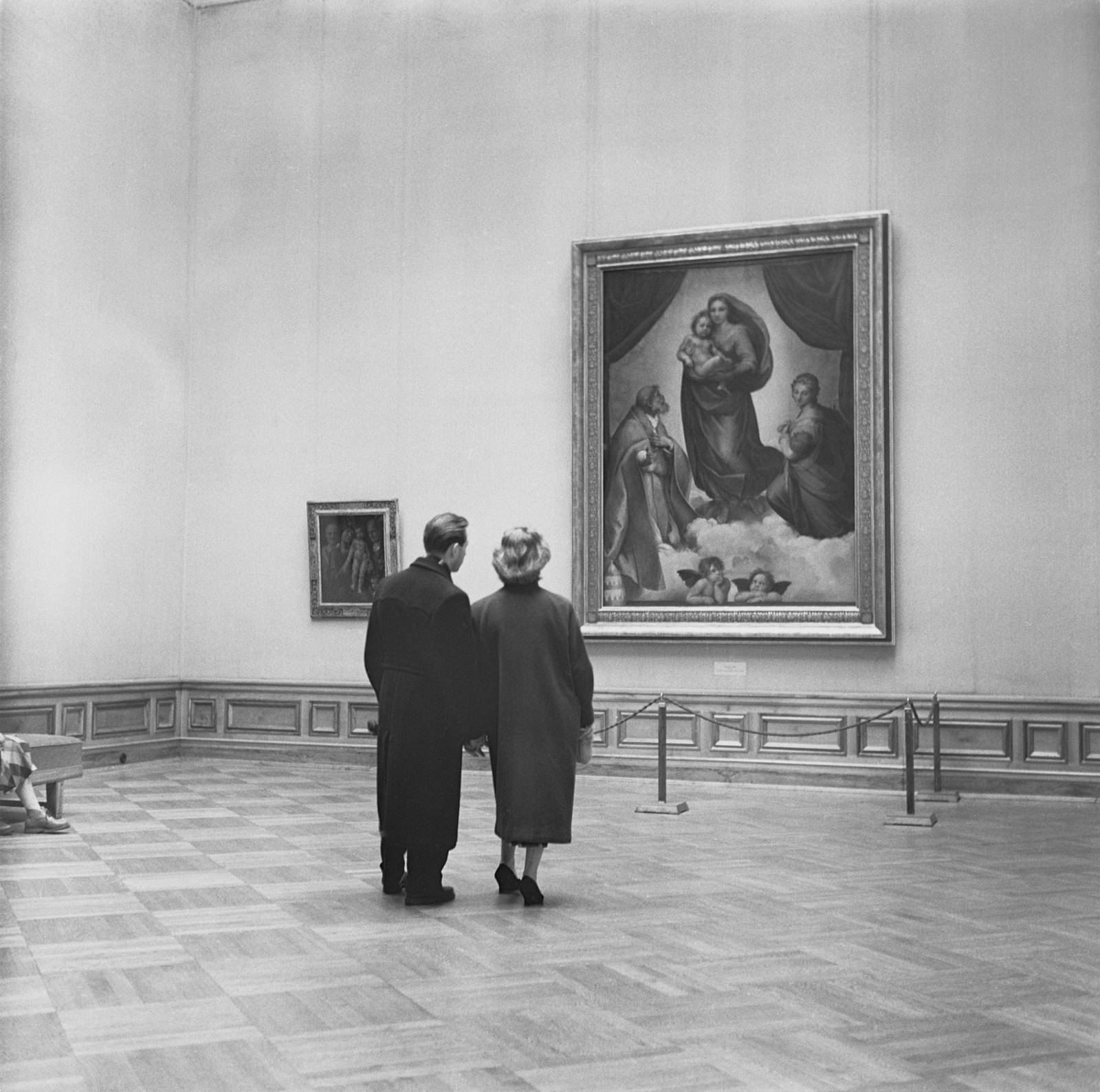 Original image description from the Deutsche FotothekDresden. Zwinger, Sempergalerie, Galerie Alte Meister, Besucher vor der "Sixtinischen Madonna" von Raffael